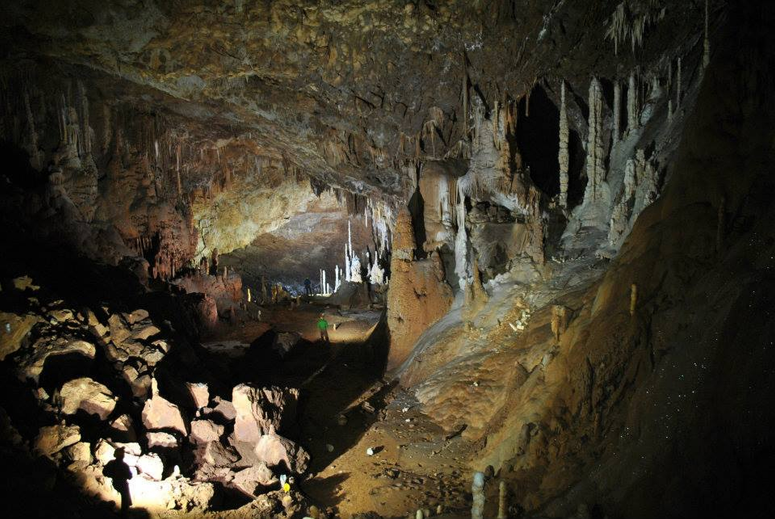 Пећина Говјештица у Рогатици This image was uploaded as part of Trace of Soul 2015.